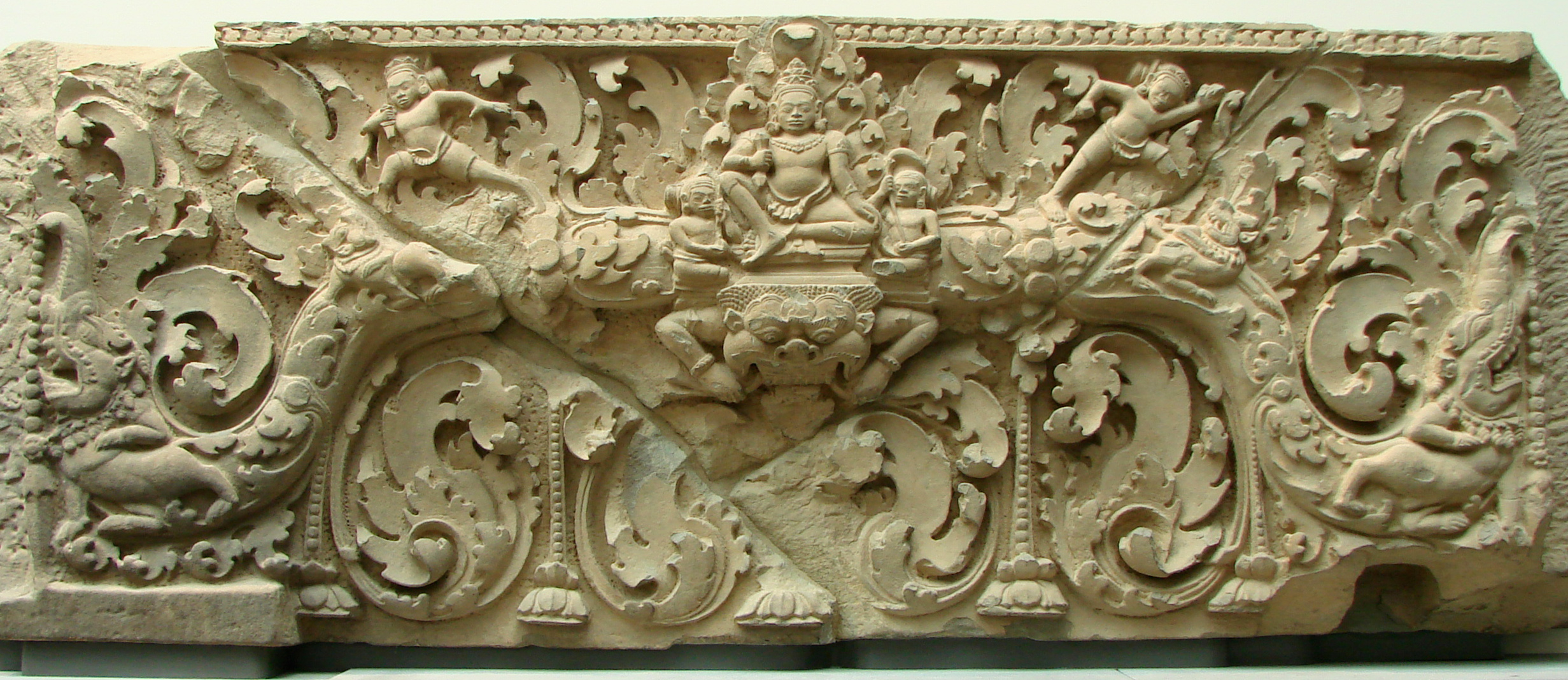 Linteau. Provenance: Cambodge, province de Siemreap, Prasat Koki (Phnom Kulen). Style de Kulen, 9ème siècle, grès. Au centre: Indra, dieu de l'orage et gardien de l'Est, entouré de serviteurs; aux extrémités, des éléphants-lions (gajasimha).Musée Guimet,Paris.